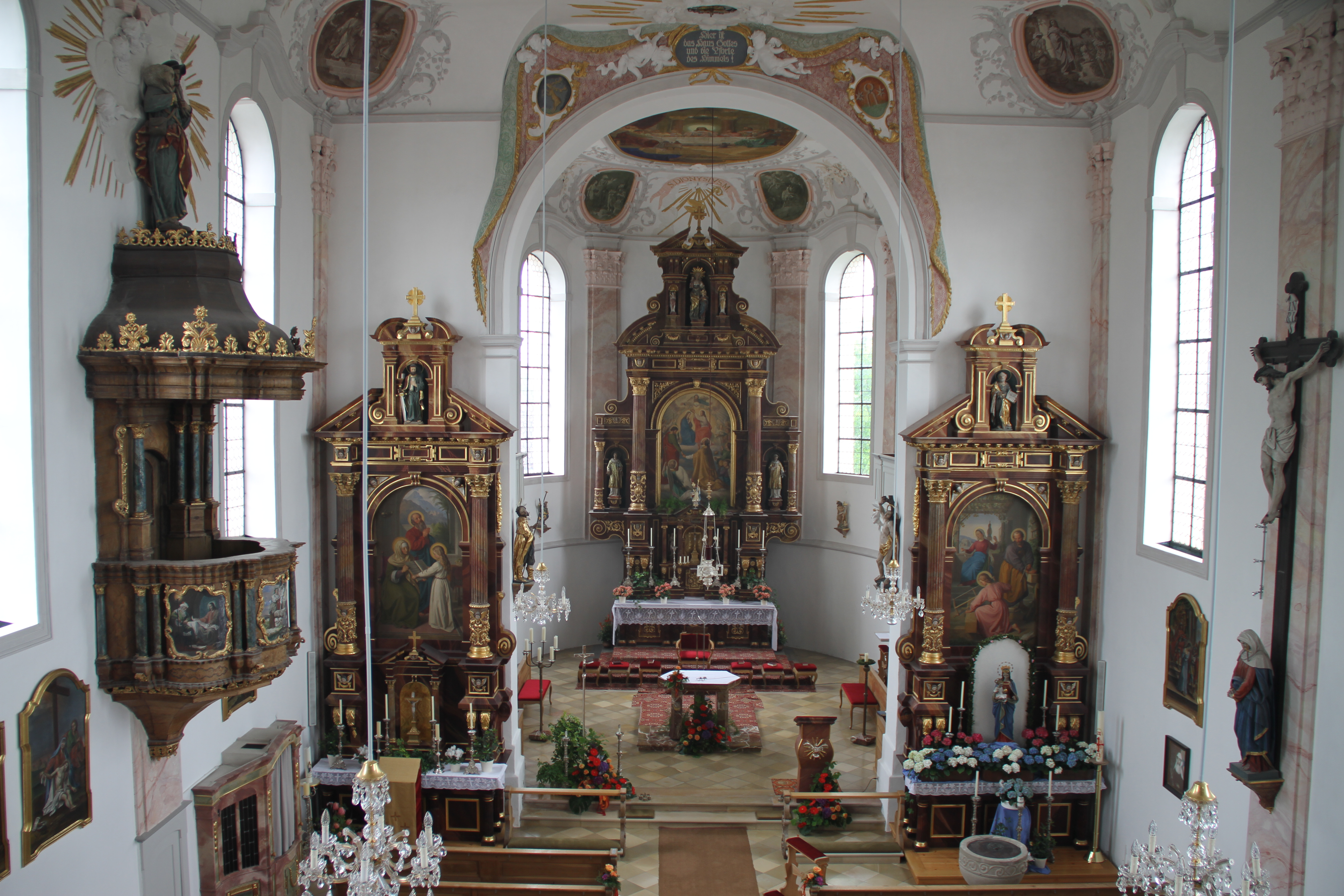 Das ist der Blick von der Empore in der katholischen Pfarrkirche St. Dionysius.